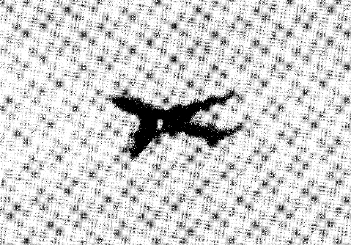 奥多摩上空を飛行する日本航空123便をとらえた写真 JTSB公表の報告書より （62-2-JA8119 日本航空(株)所属 ボーイング 747SR-100型 JA8119 群馬県多野郡上野村）